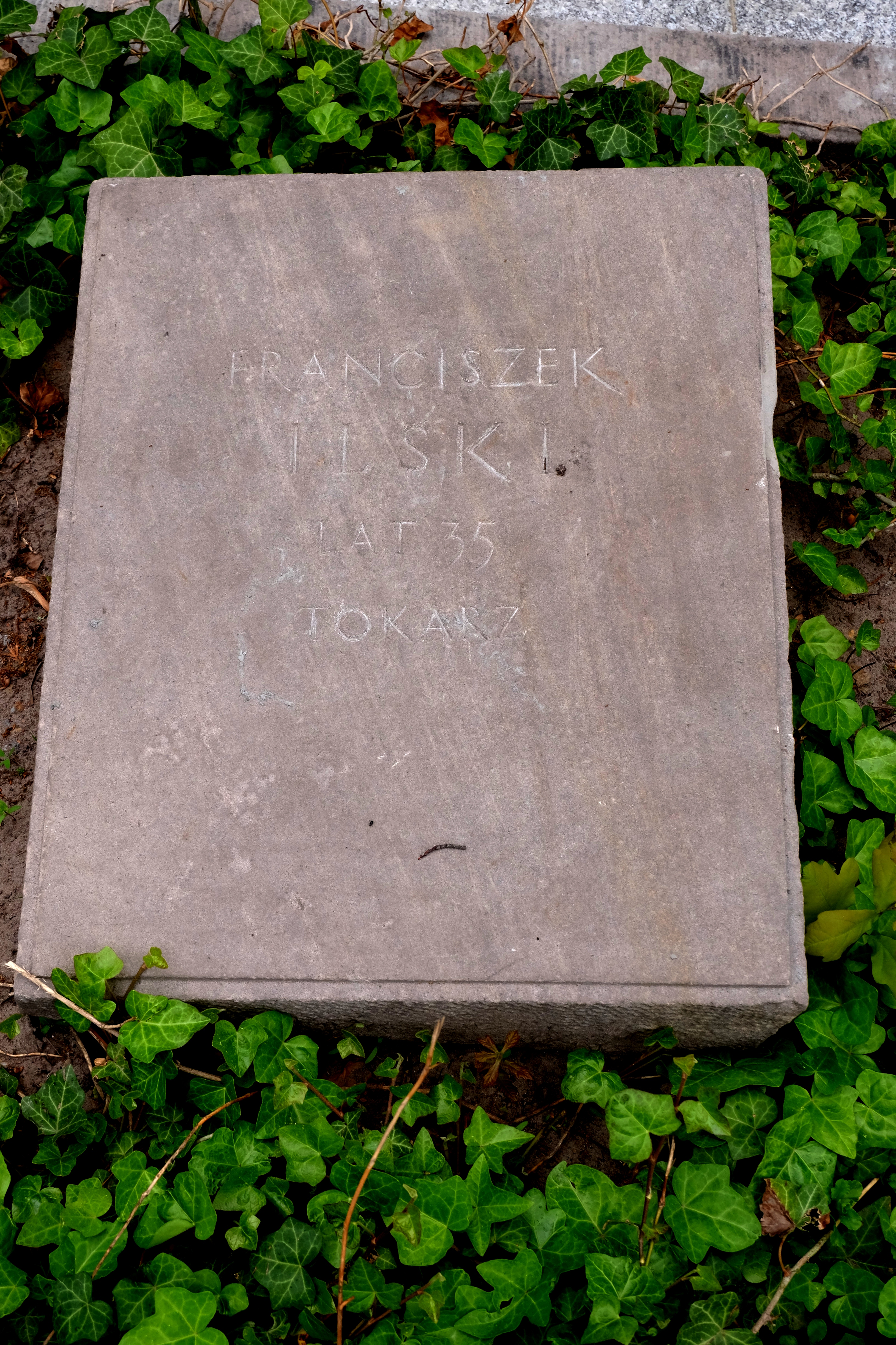 Grób działacza komunistycznego Franciszka Ilskiego na Cmentarzu Wojskowym na Powązkach w Warszawie